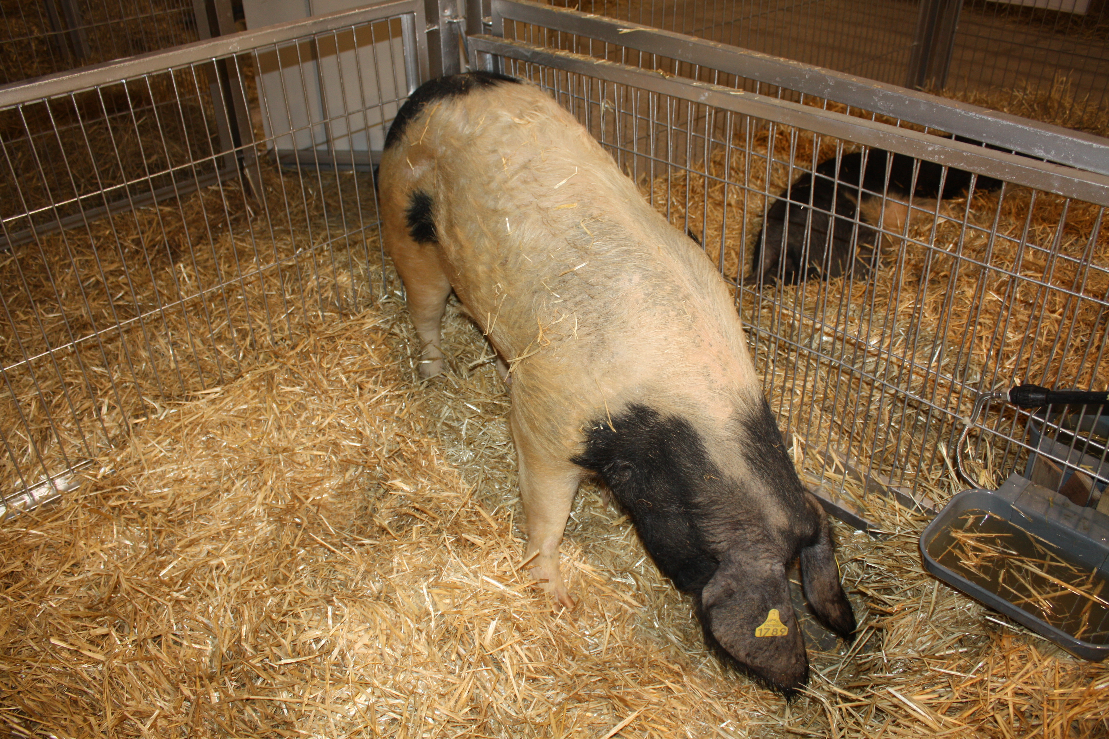 Exemplar de porco celta na Feira de Silleda